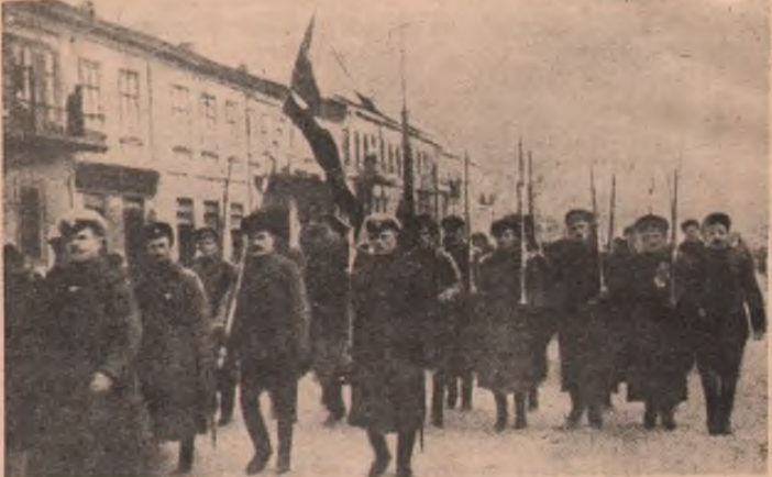 Зміна варти українським відділом в Одесі. Осівь 1917 р.